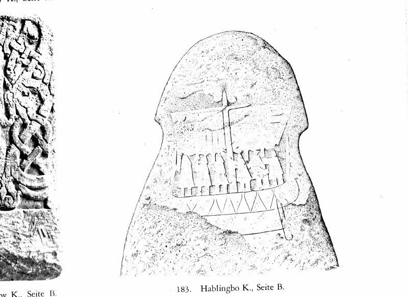 Bildsten, foto efter teckning av Olof Sörling. Kategori: (09) Runstenar, bildstenarBildsten, foto efter teckning av Olof Sörling.